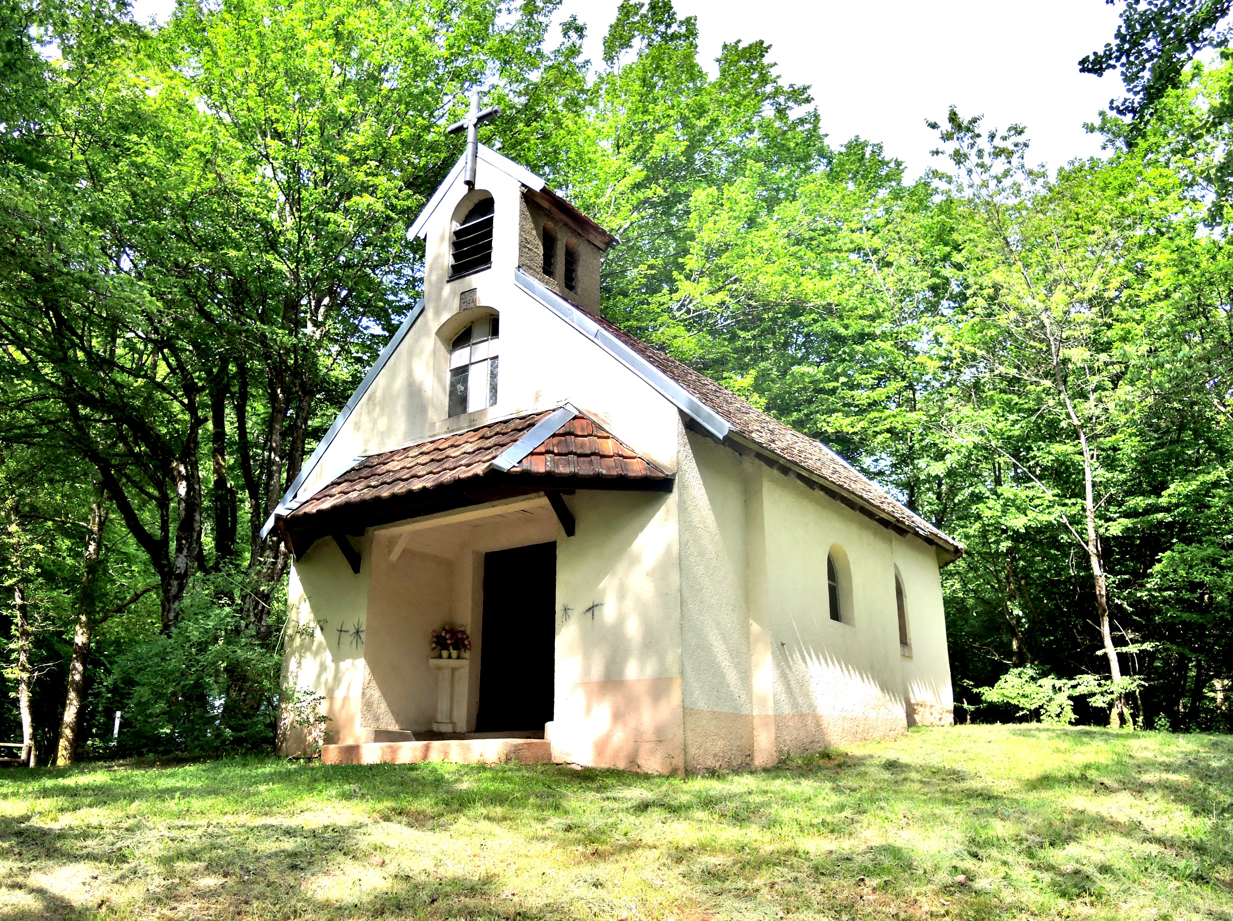 Chapelle du mont Bonnet, à Etueffont. Territoire de Belfort